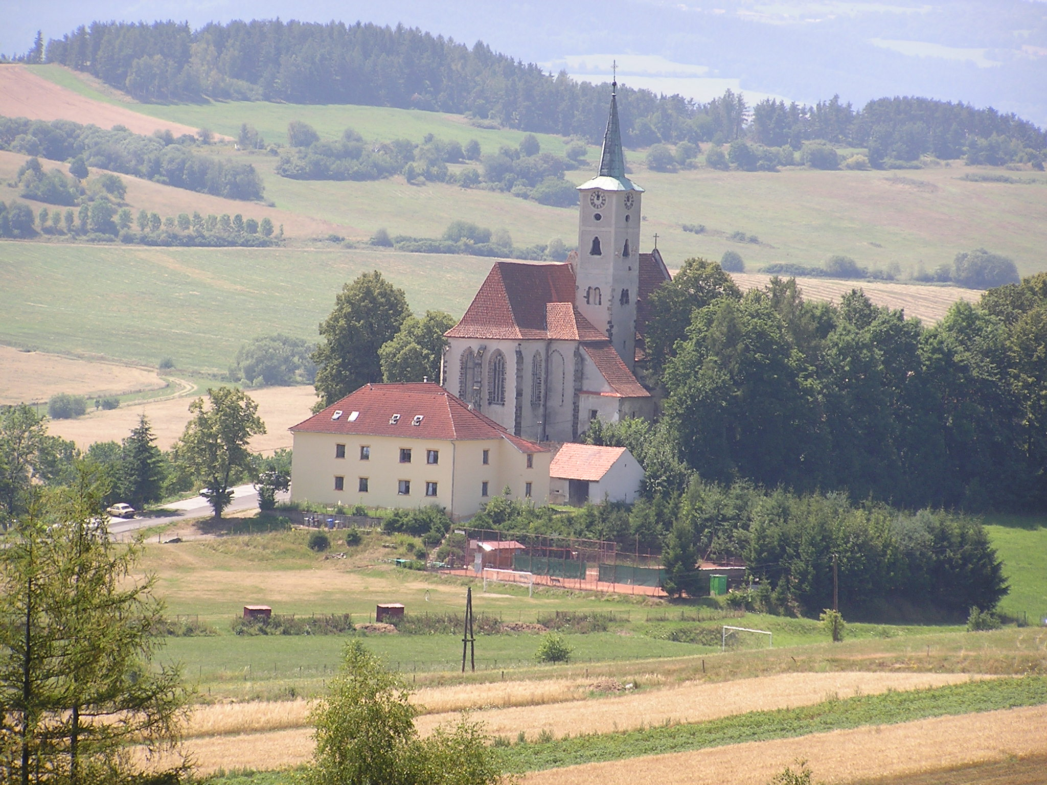 Kostel Nanebevzetí P. Marie (Nezamyslice), Nezamyslice